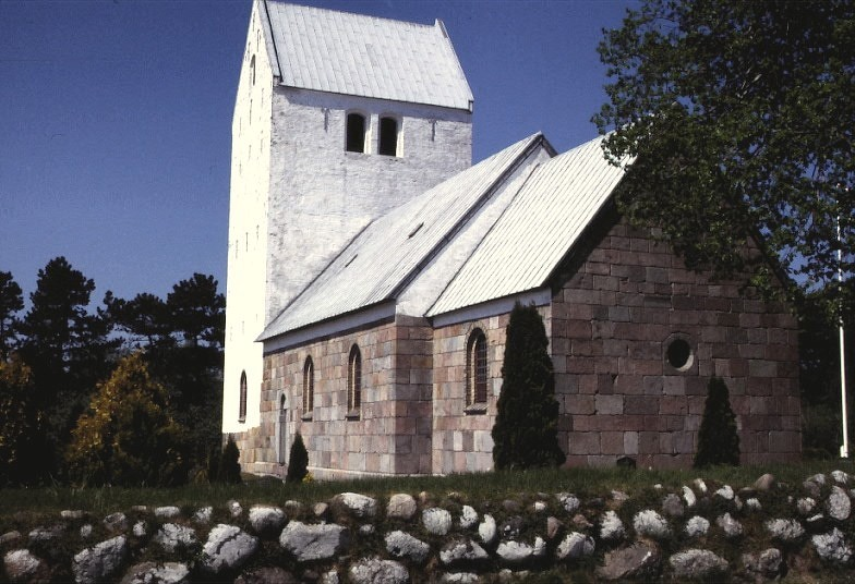 Rimsø Kirke i Danmark. Rimsø kirke